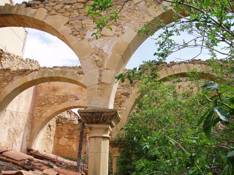 Arcos de la antigua cofradía en Olocau del Rey, Castellón, España / Spain